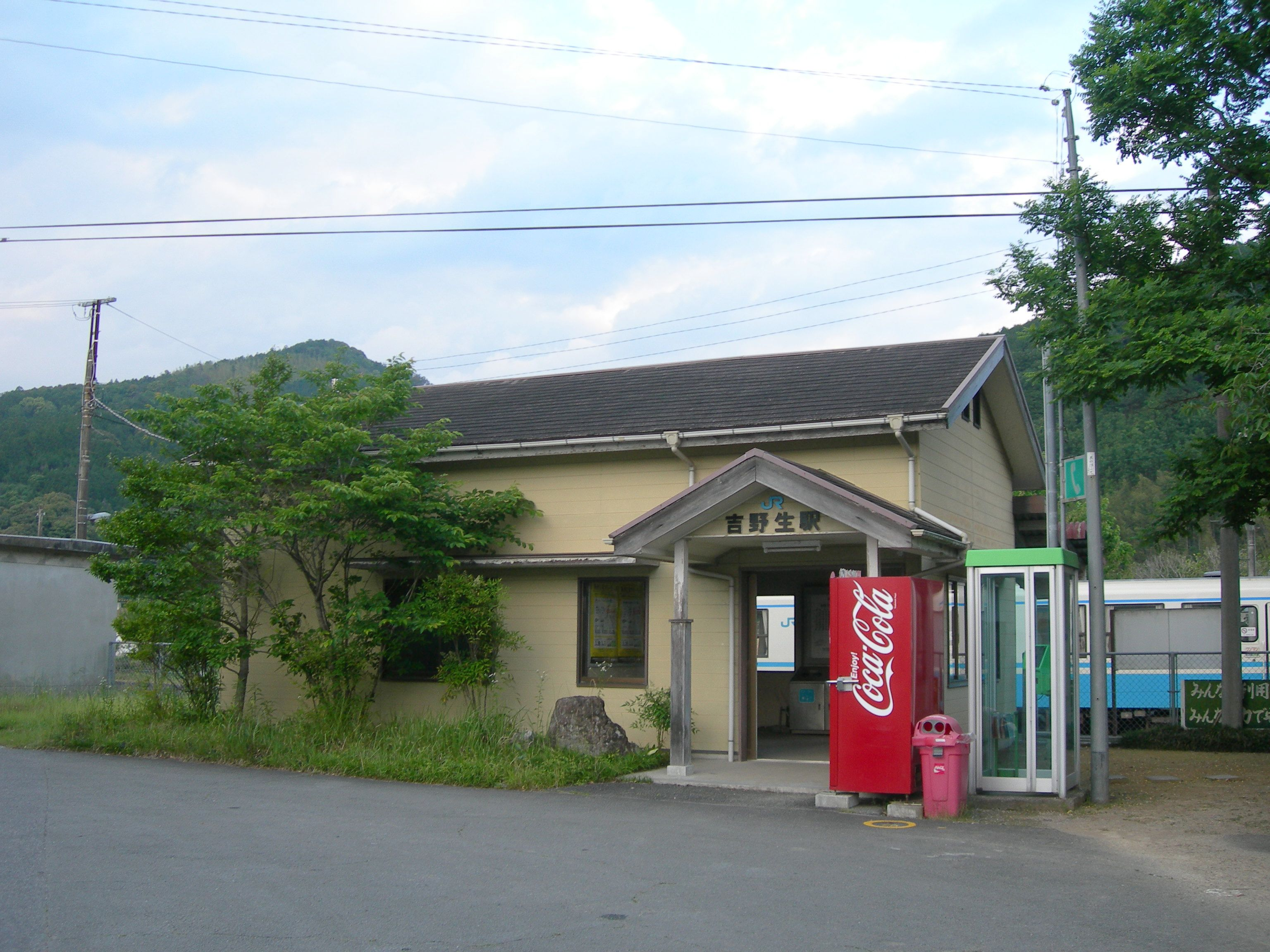 予土線 吉野生駅